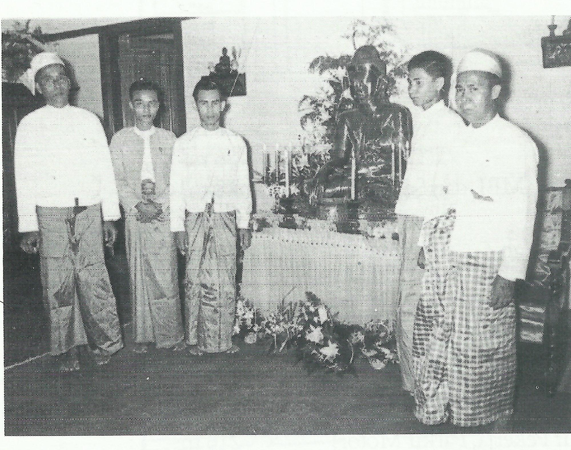 Buddharupang merupakan pemberian dari Burma Buddha Sasana Council